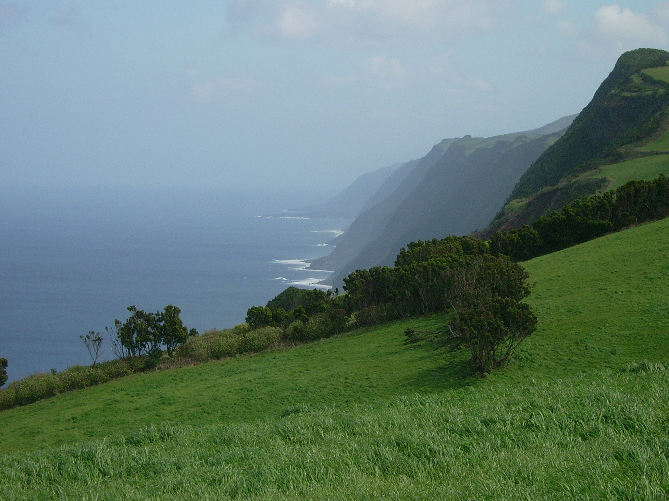 Vista da Costa Norte da ilha de São Jorge, Miradouro da Fajã de Fernando Afonso, Parque Florestal das Sete Fontes, Próximo do Toledo.